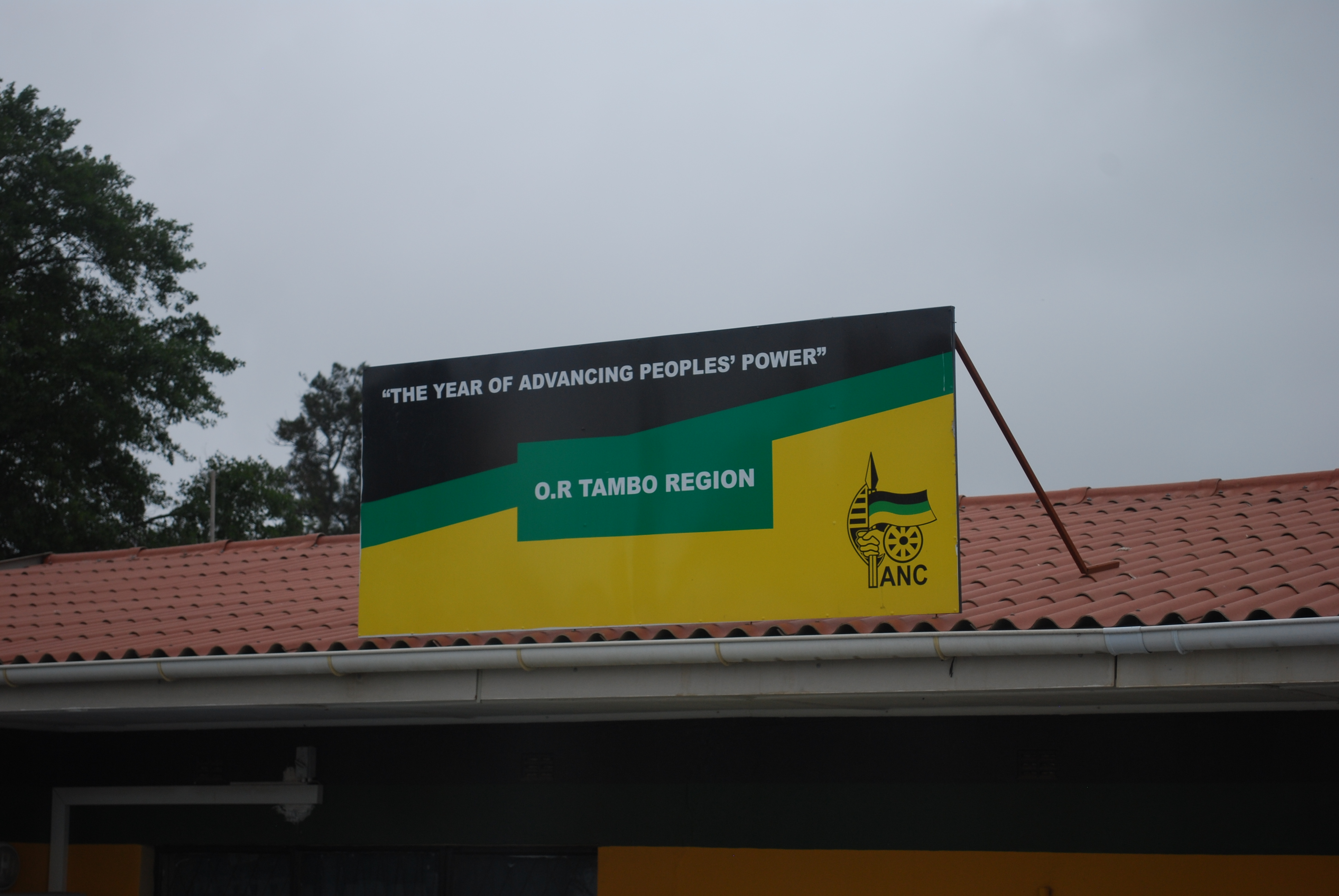 Bord van het Afrikaans Nationaal Congres (ANC)